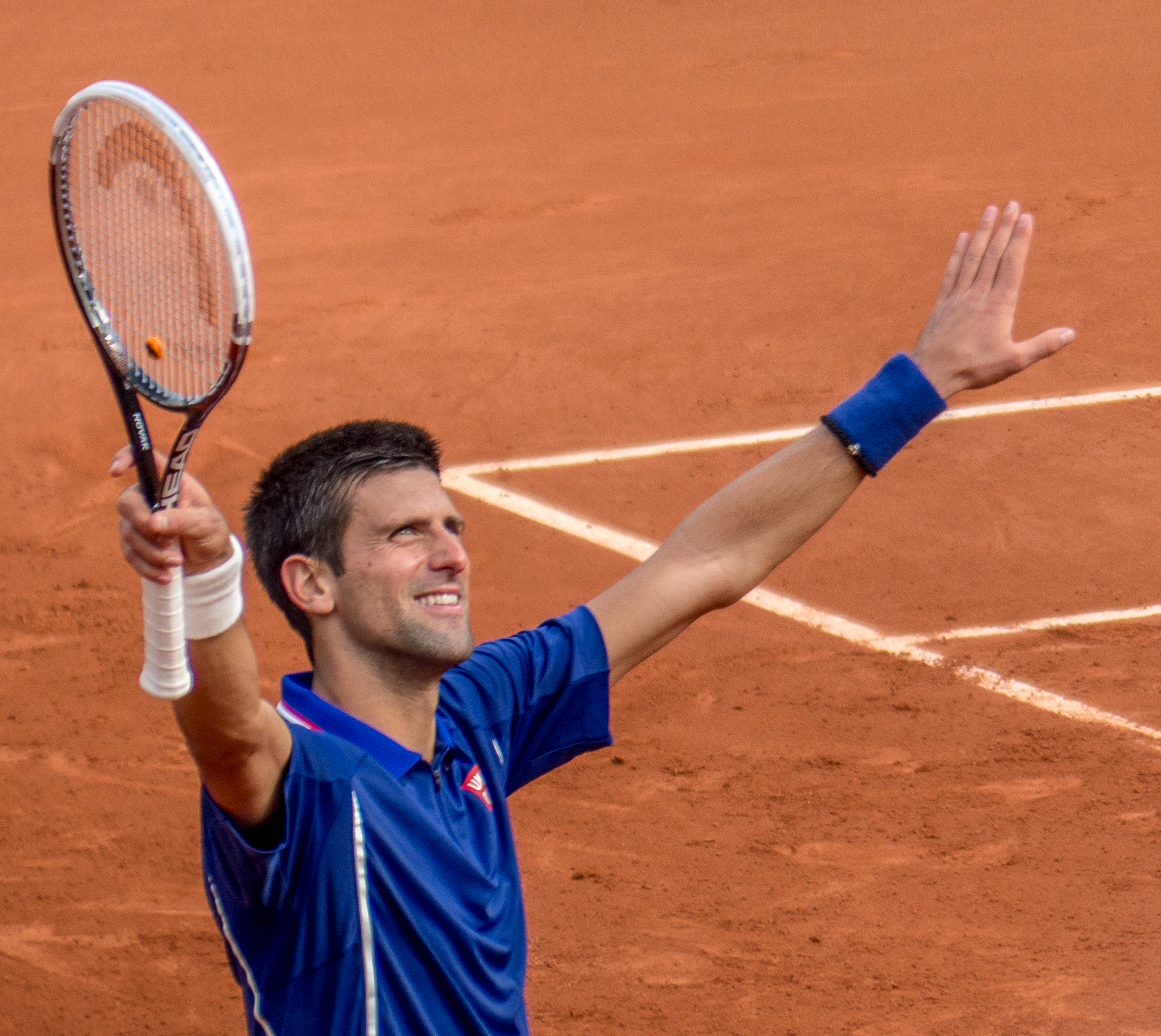 2ème tour Roland Garros 2013 : Novak Djokovic (SRB) def. Guido Pella (ARG)